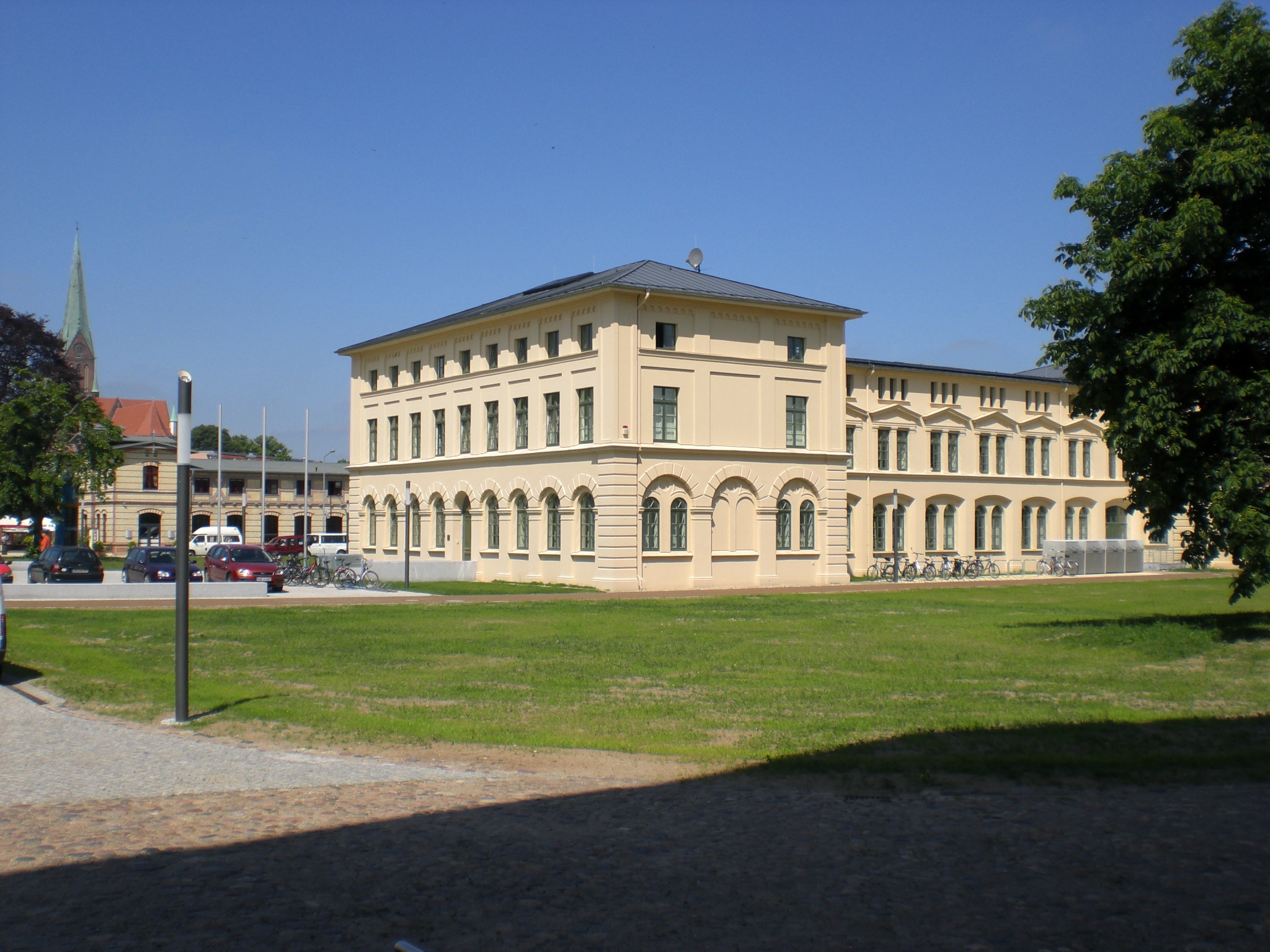 Schwerin: Ministerium für Bildung, Wissenschaft und Kultur